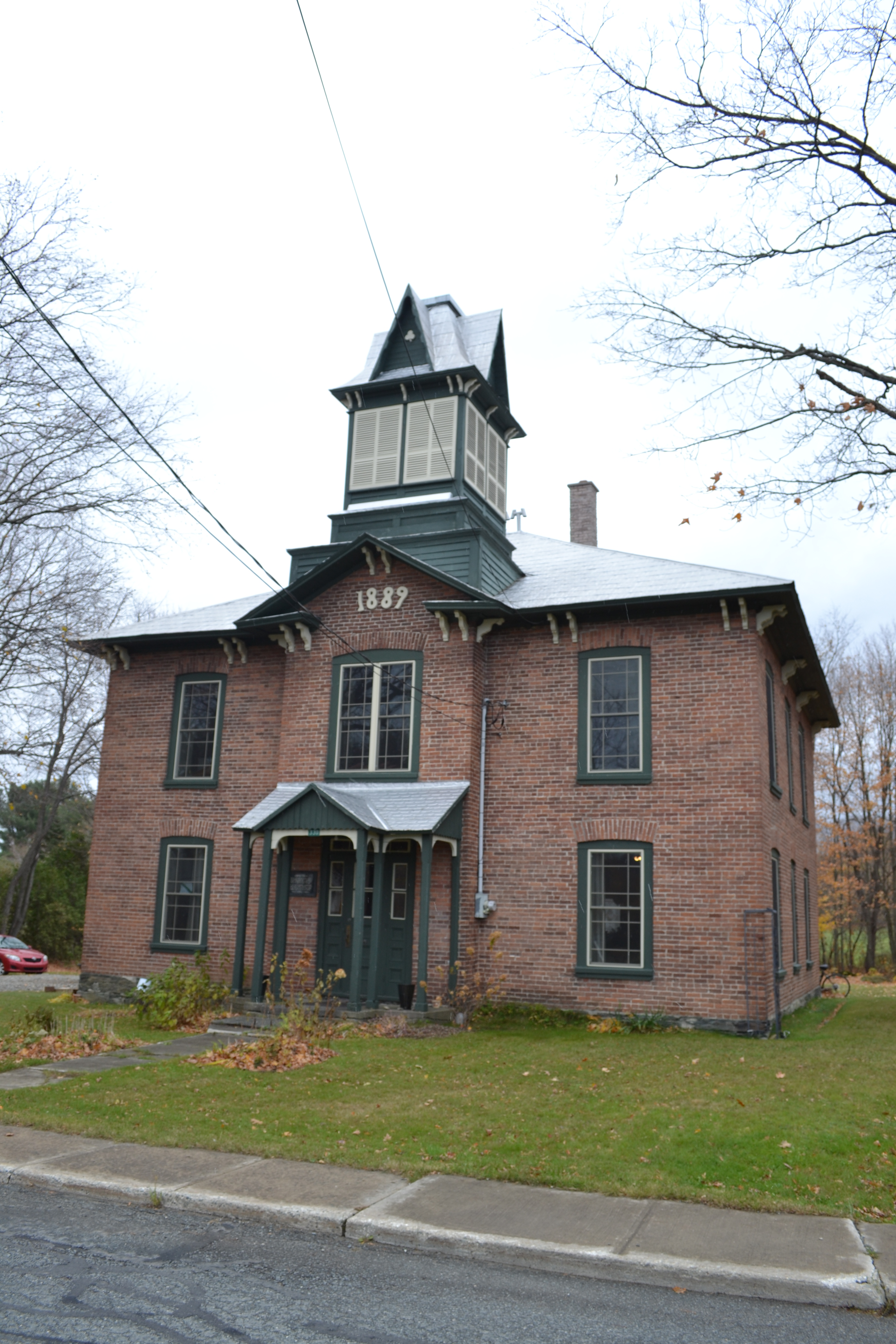 Académie d'Inverness, Quebec